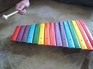 Монгол: Зураг Монгол: Зураг№